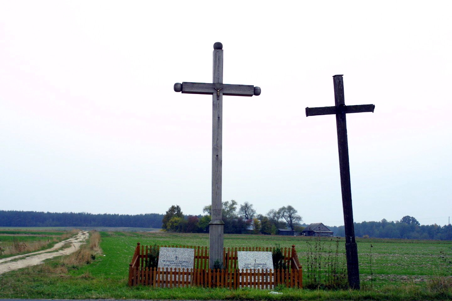 Wymysły. Krzyż przydrożne z tablicami upamiętniającymi śmierć: z prawej - żołnierza AK Adama Sosnowskiego pseudonim "Grot", z lewej - nieznanego żołnierza niemieckiego.